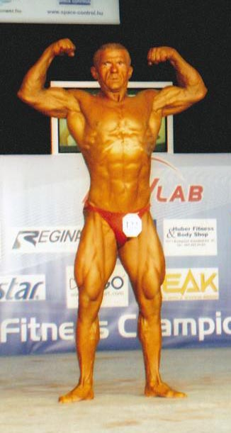 Vasile Craciun - culturist din Braila, Romania